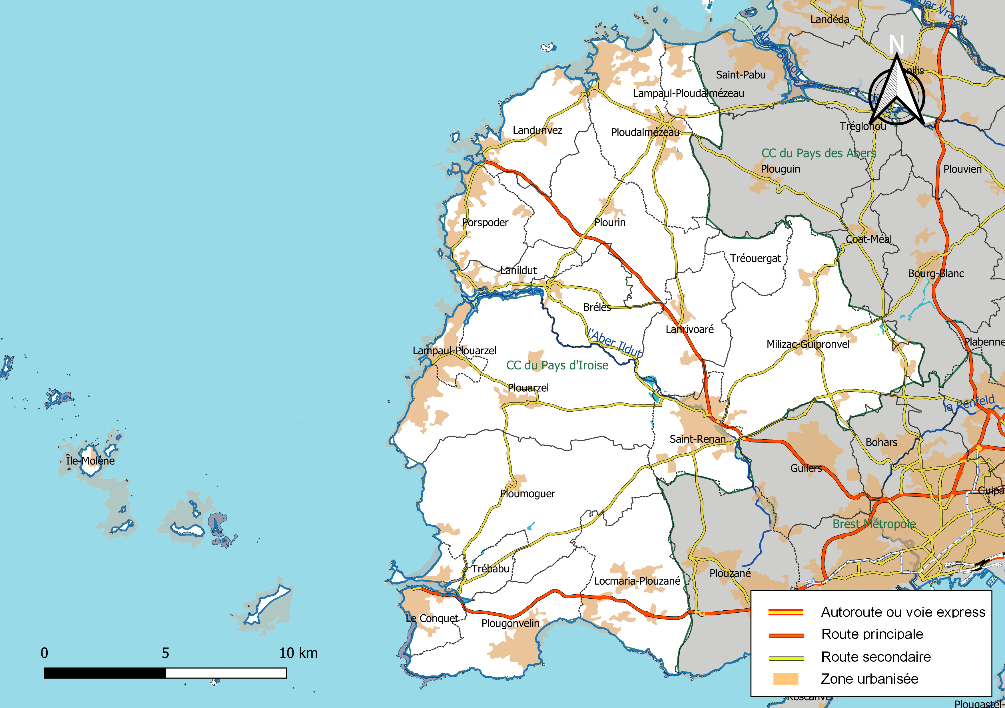 Carte géographique de la Communauté de communes du Pays d'Iroise, département du Finistère, France. Composition au 1er janvier 2019.